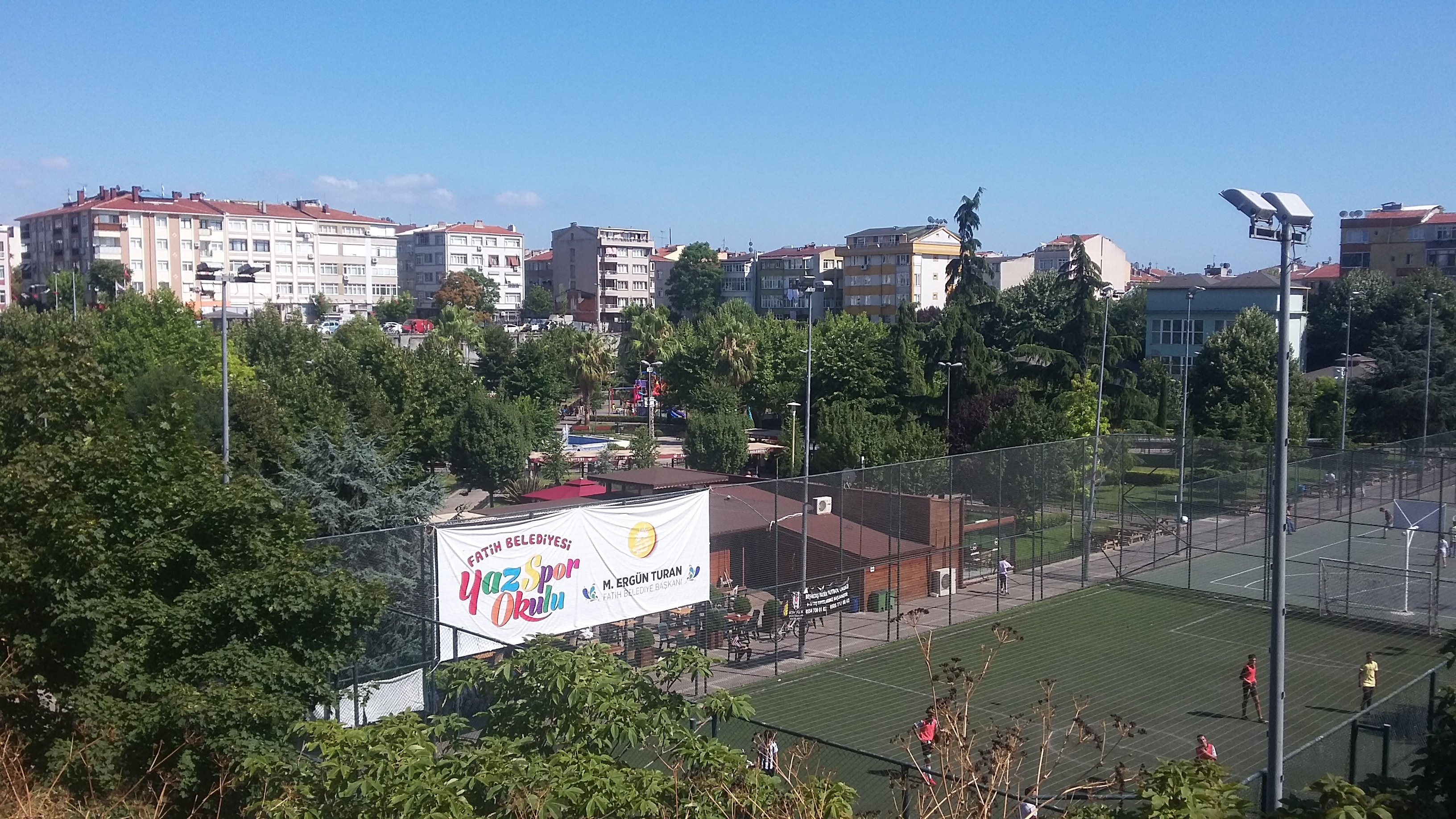 Günümüzde park ve sosyal etkinlikler alanı olarak kullanılan ve halk arasında Altımermer Çukurbostanı olarak bilinen Hagios Mokios Sarnıcı'nın bulunduğu bölge.